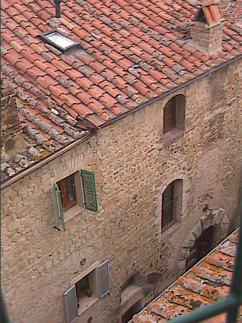 Veduta dall'alto della facciata principale del Palazzo Mannucci Benincasa di Montisi, in provincia di Siena.